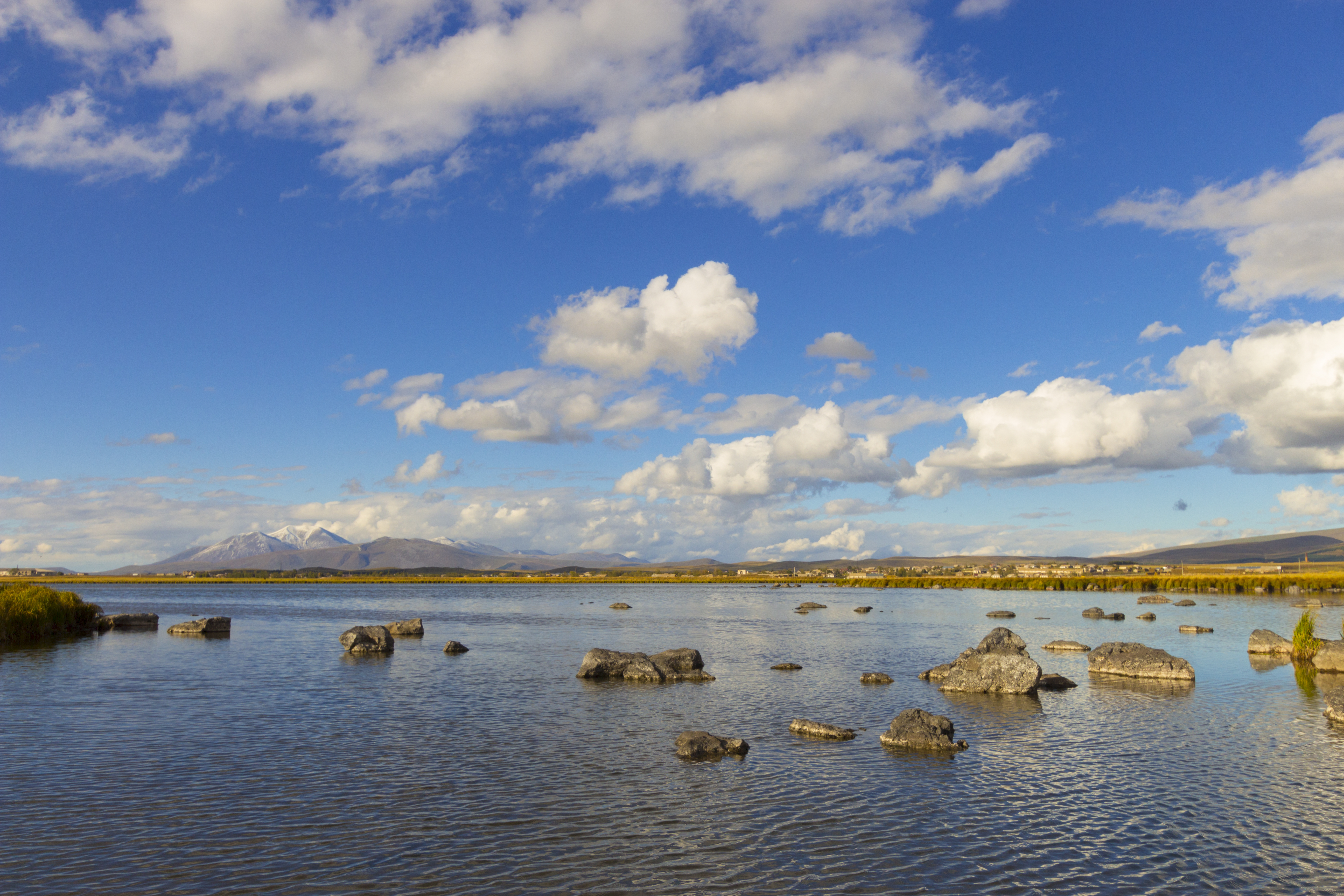 ბუღდაშენის ტბა მდებარეობს ჯავახეთის ზეგანზე, ზღვის დონიდან 2040 მეტრზე. საქართველოს სამხრეთ ნაწილში